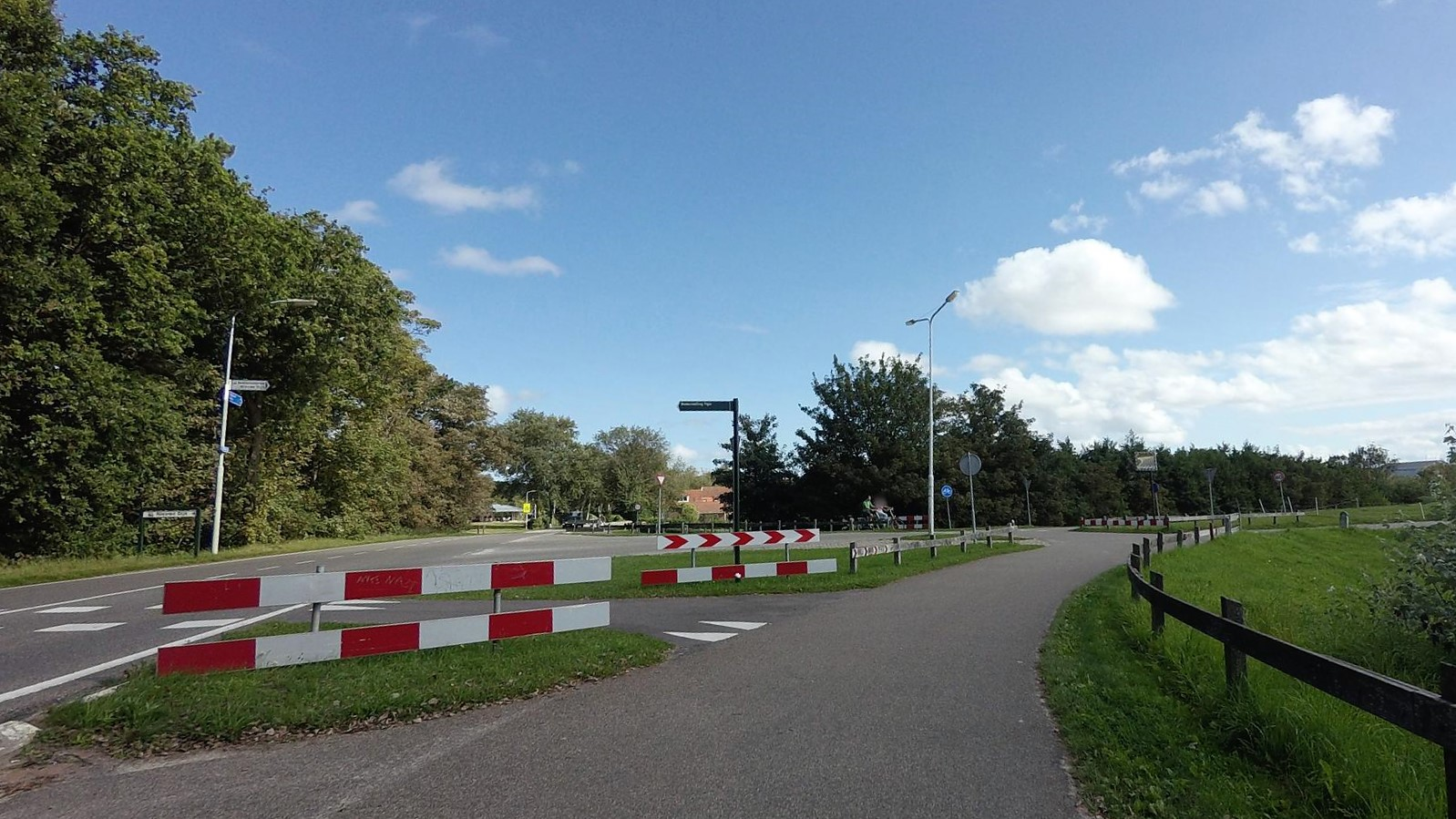 Halfweg, Burgemeester van Heusdenweg, Terschelling